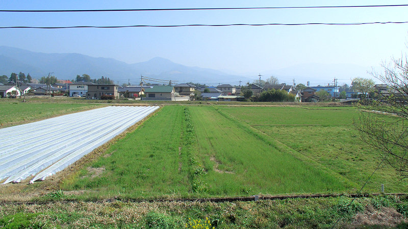 くま川鉄道湯前線ja:東多良木駅 駅周辺 ホーム上から南側を見る。 撮影者/著者/著作権保有者 : MK Products (本人がアップロード) 撮影日 : 2007/03/30 東多良木駅用にアップロードした画像です。良い画像があれば別の画像に変えてください。